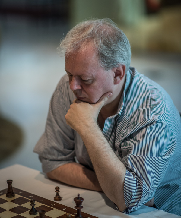 Jonny Hector blev stormästare i schack 1991. Foto: Lars OA Hedlund